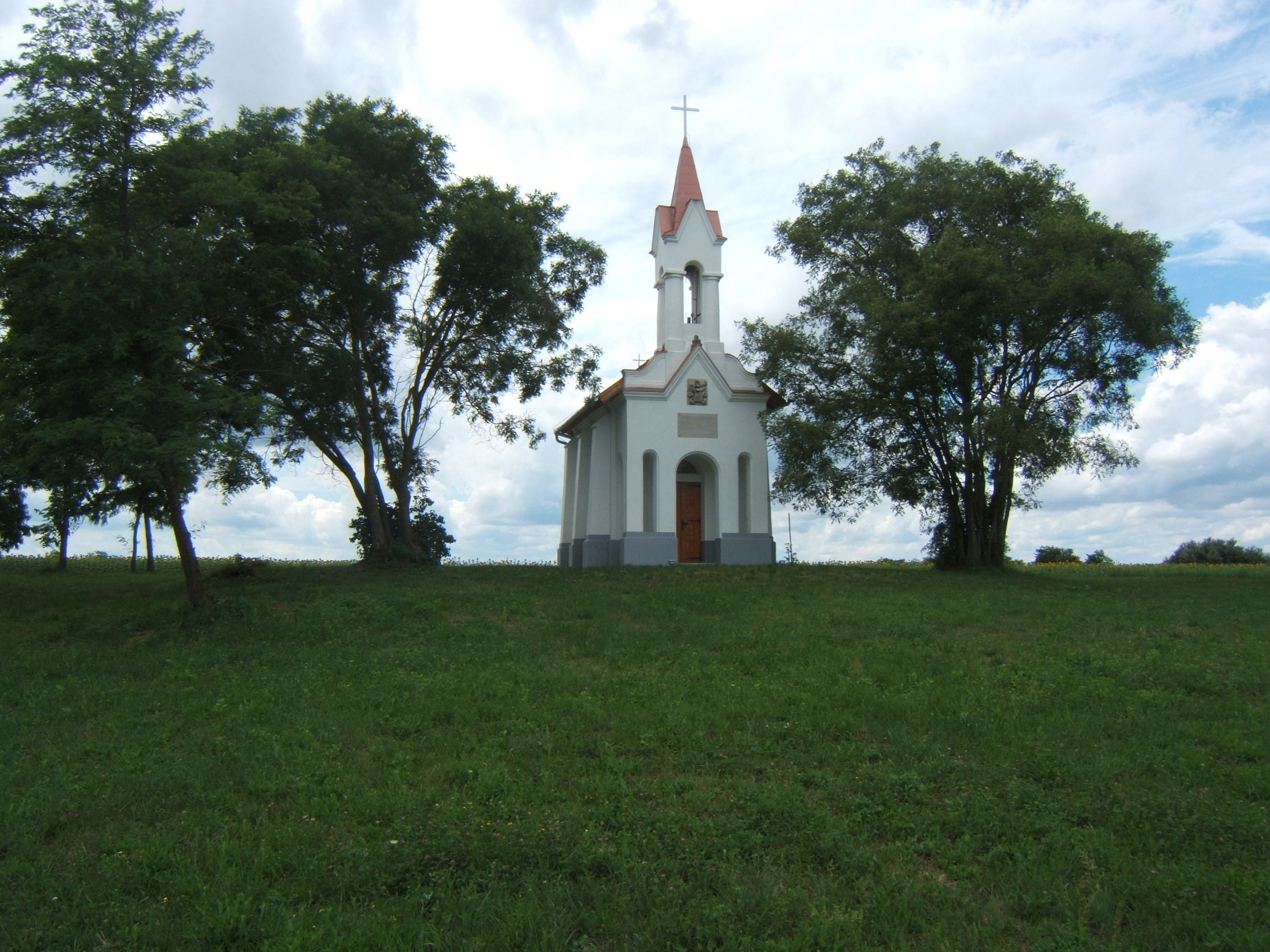 Kiskorpád, Kapotsfy-kápolna